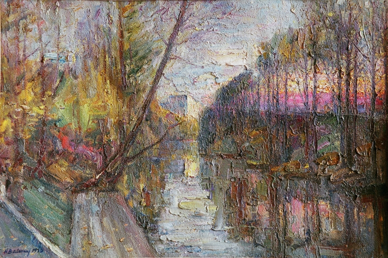 Санаторий «Криница», Республика Беларусь, Минский р-н